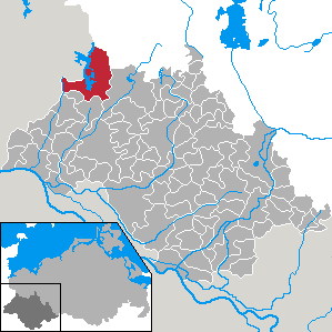 Zarrentin am Schaalsee in Mecklenburg-Vorpommern - district Ludwigslust